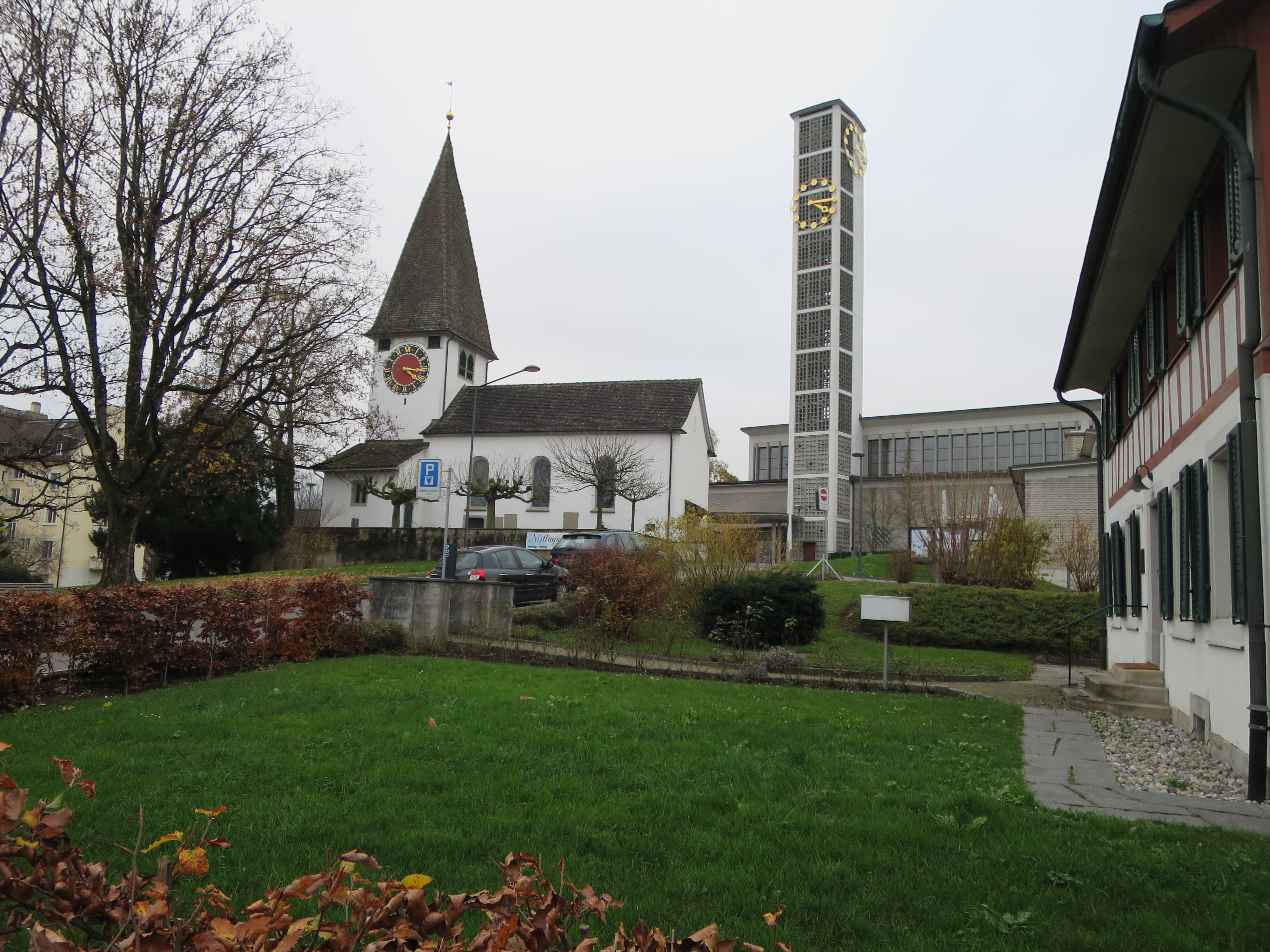 Neue Kirche Altstetten